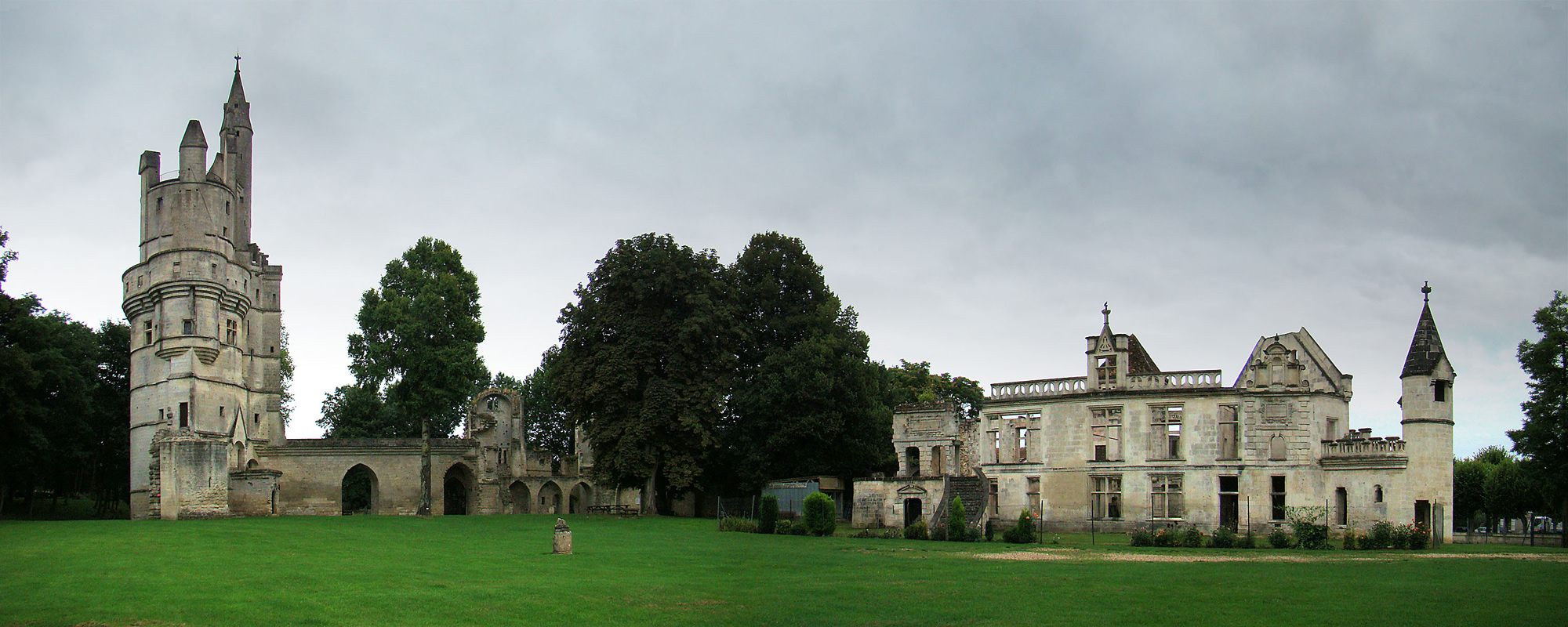 Septmonts, Aisne, Picardie, France. Donjon, palais des évêques et parc.